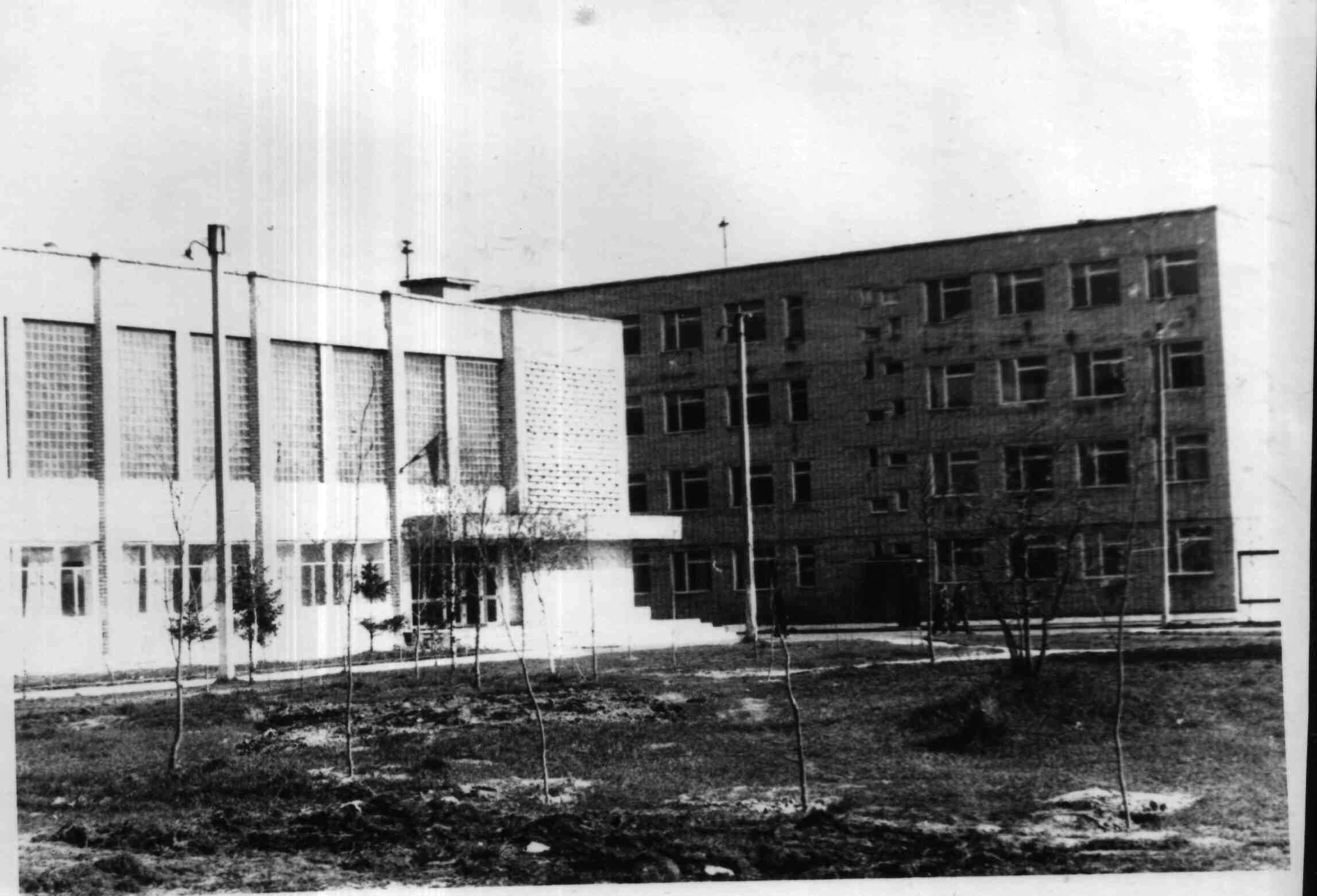 Шосткинське ВПУ перед 1 вересня 1977 року